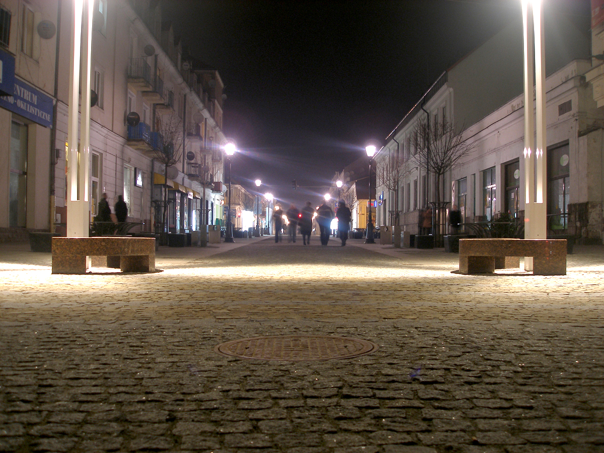 Deptak ulicy Tumskiej w Płocku